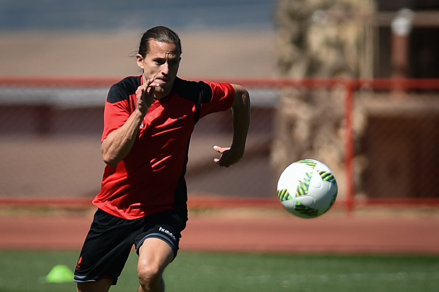 Centro de Capacitação Física do Corpo de Bombeiros Militar, Setor Policial Sul, Brasília, DF, Brasil 2/8/2016 Foto: Andre Borges/Agência Brasília. A seleção olímpica de futetbol masculina da Dinamarca treinou na tarde desta terça-feira (2) no Centro de Capacitação Física do Corpo de Bombeiros Militar, Setor Policial Sul.